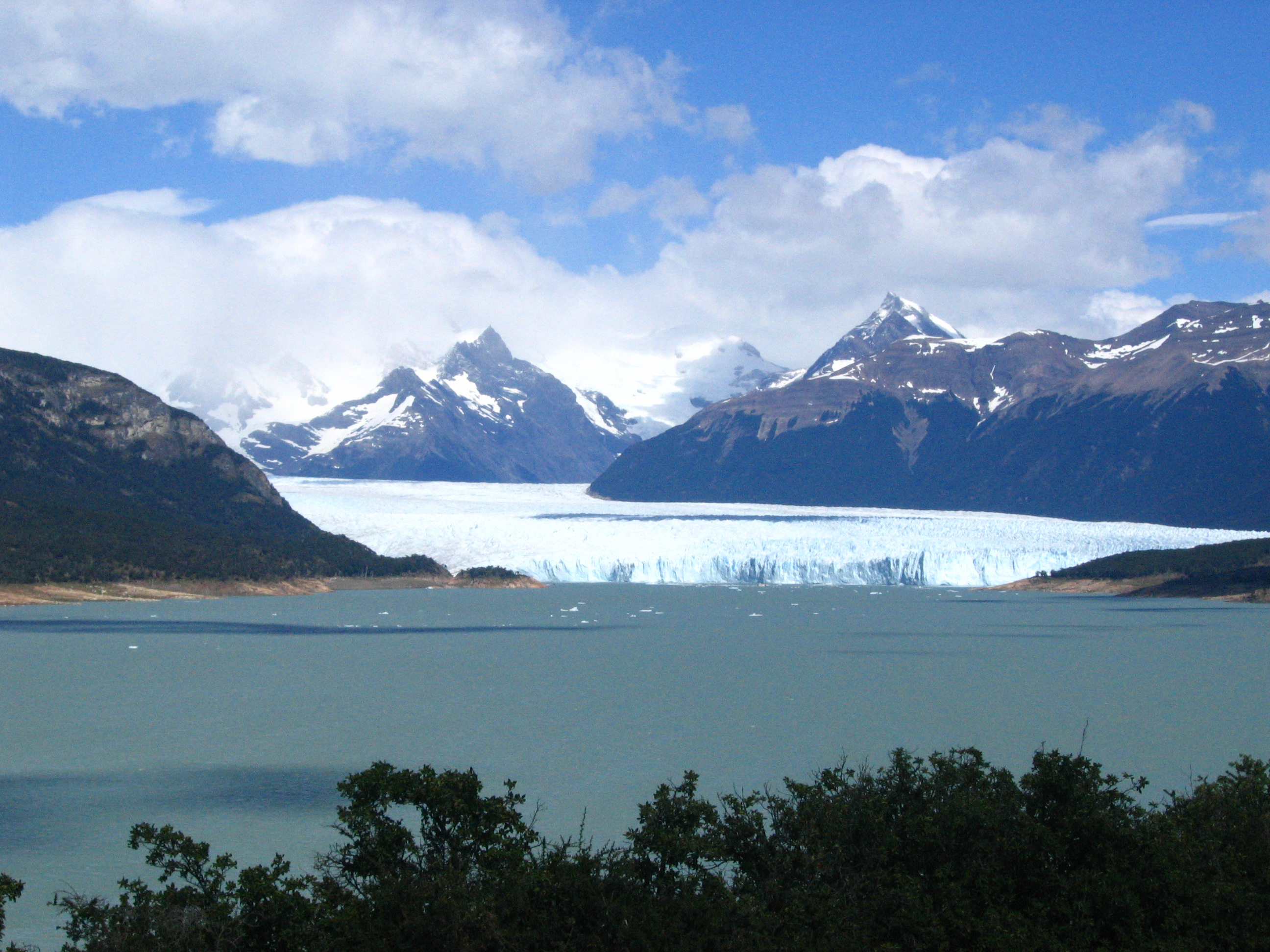 קרחון מורינו